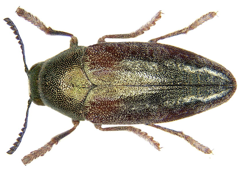 Familie: Buprestidae Groesse: 14 mm Fundort: Namibia, Omaruru, 1200 m leg. U.Schmidt, 1994; det. H.Mühle Photo: U.Schmidt, 2006